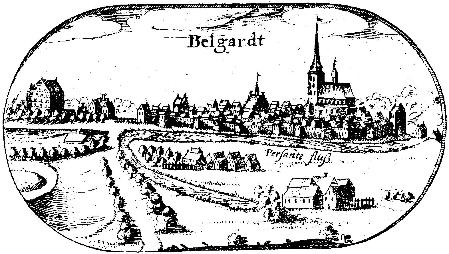 Rycina miasta Białogard z mapy Lubinusa - Mapa księstwa pomorskiego z 1618 roku.